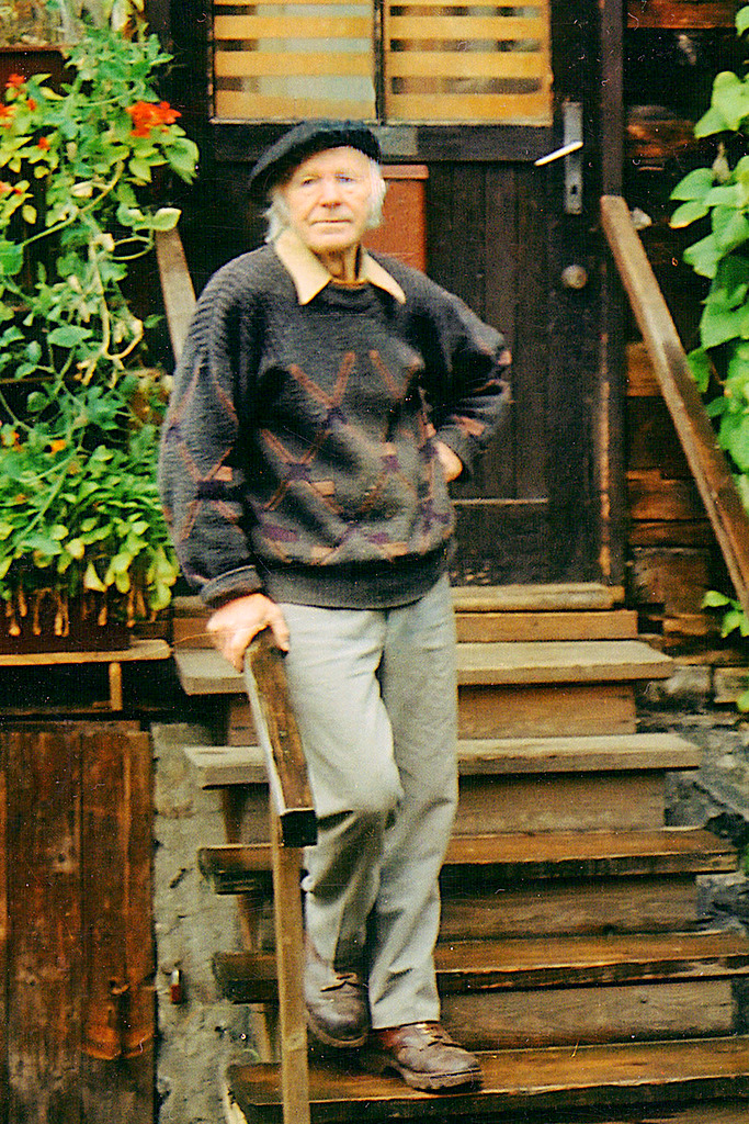 Henryk Burzec pod drzwiami swojej pracowni w Zakopanem.